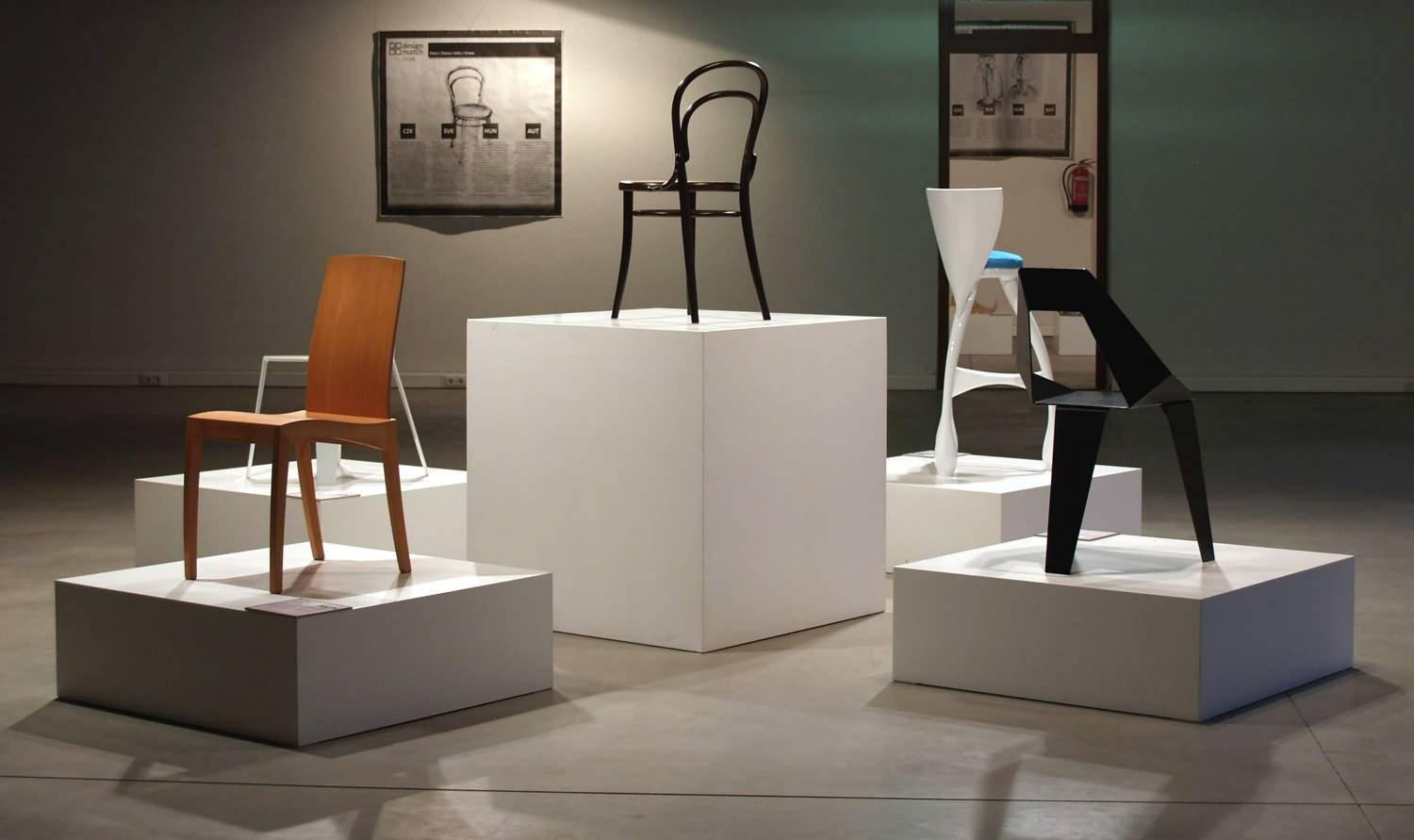 Výstava Design Match, přehlídka designu v Národní galerii v Praze, 2008